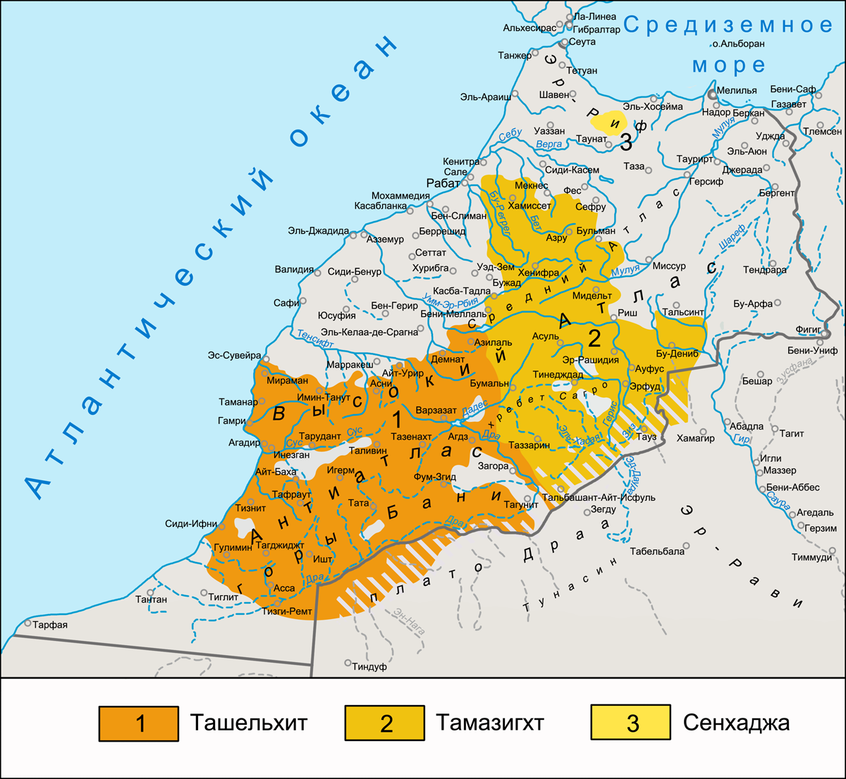 Карта атласских языков (ташельхит, тамазигхт, сенхаджа). Источник: Stichting Metalsa.Imazighen. Riff en Jbella